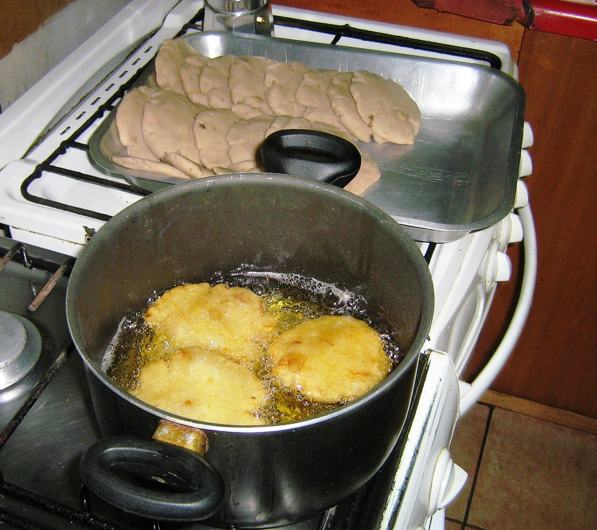 Milcaos fritos y crudos.